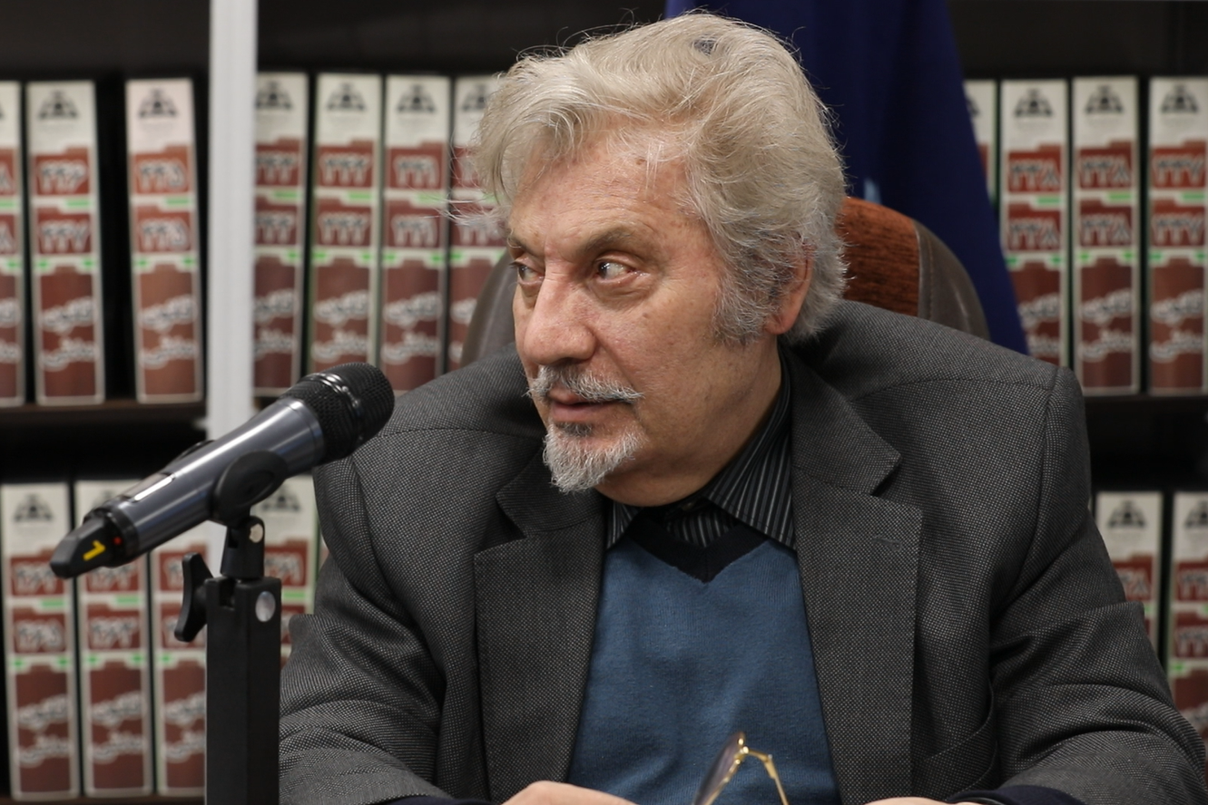 محسن محبی در مرکز پژ.وهشی دانشنامه های حقوقی علامه